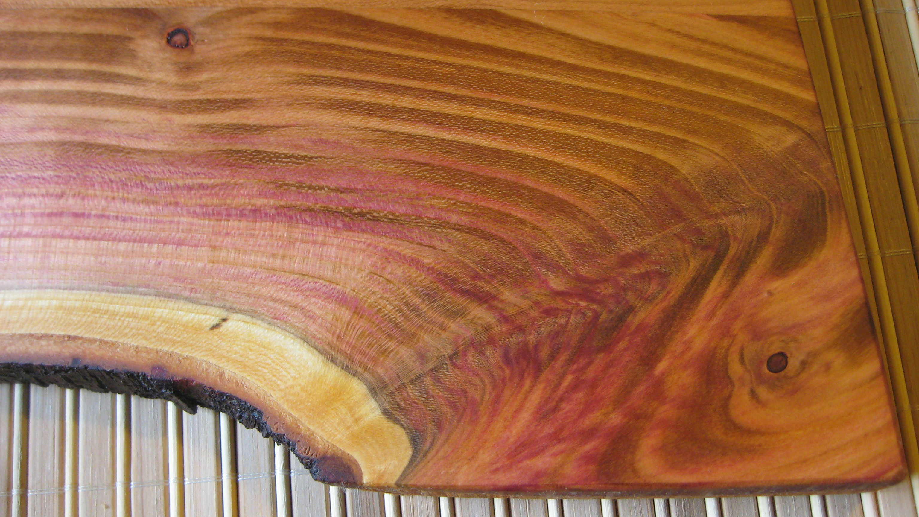 ein essbrettchen aus pflaumenholz, frisch gefertigt, etwa 6 monate nach baumschnitt, unterer stamm